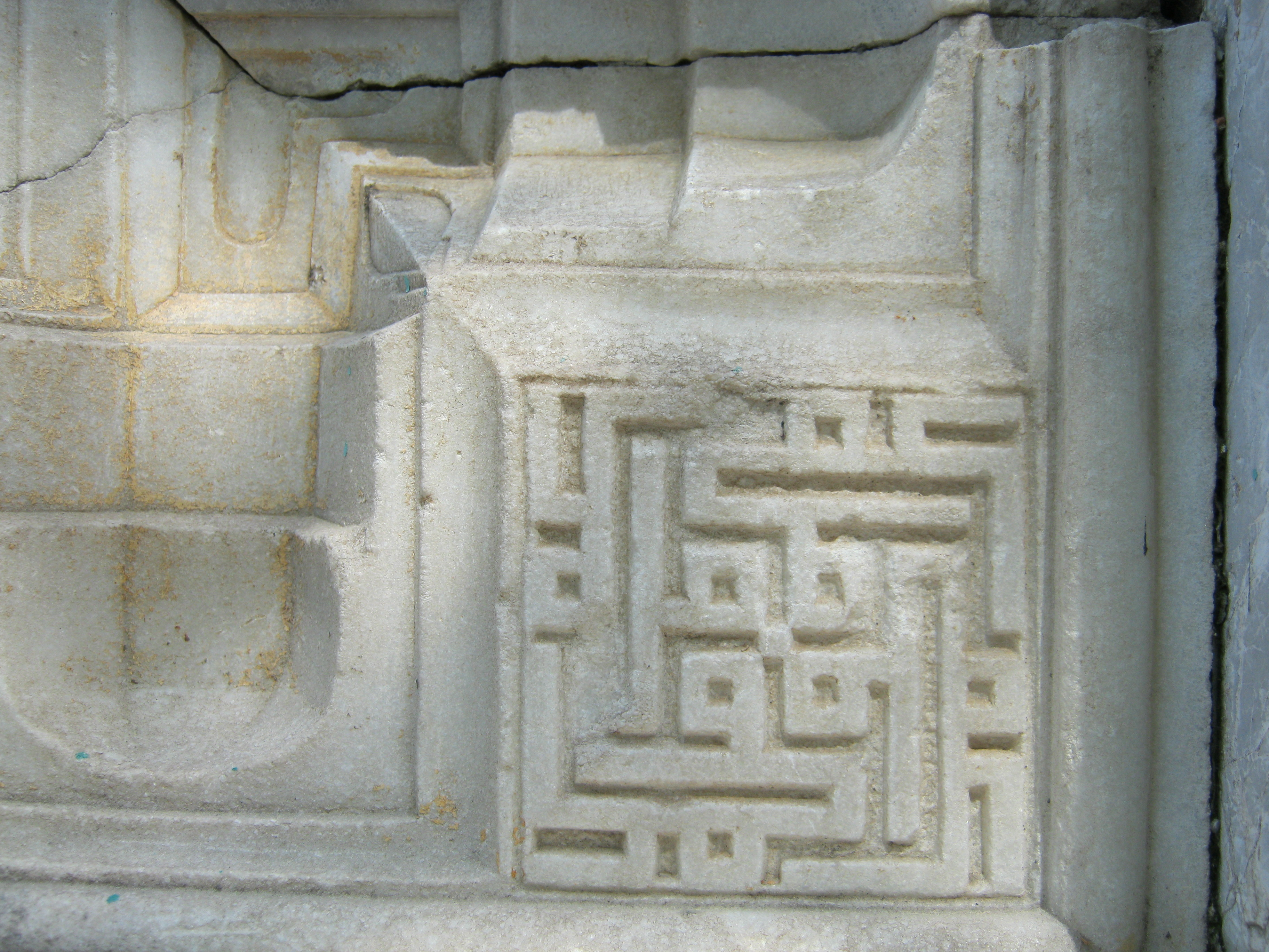 Yıldırım Bayezid Camii Bursa